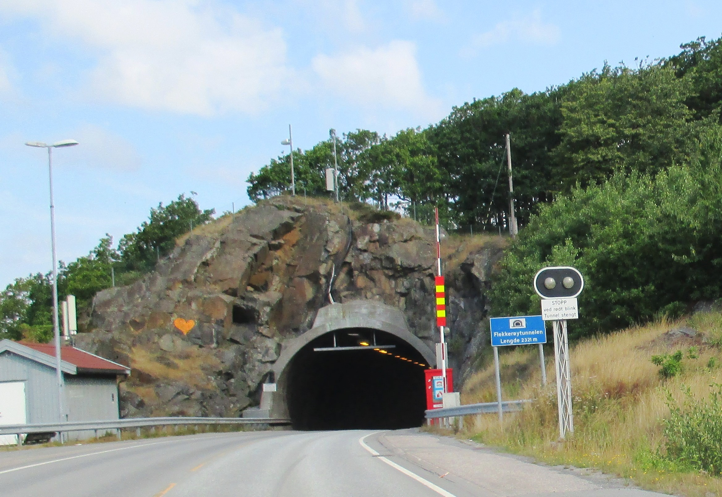 Flekkerøytunnelen fra Flekkerøya